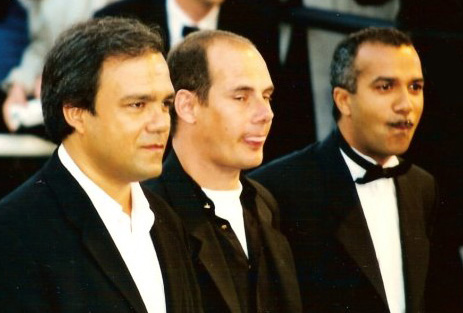 Le trio comique français Les Inconnus (Didier Bourdon, Bernard Campan, Pascal Légitimus).